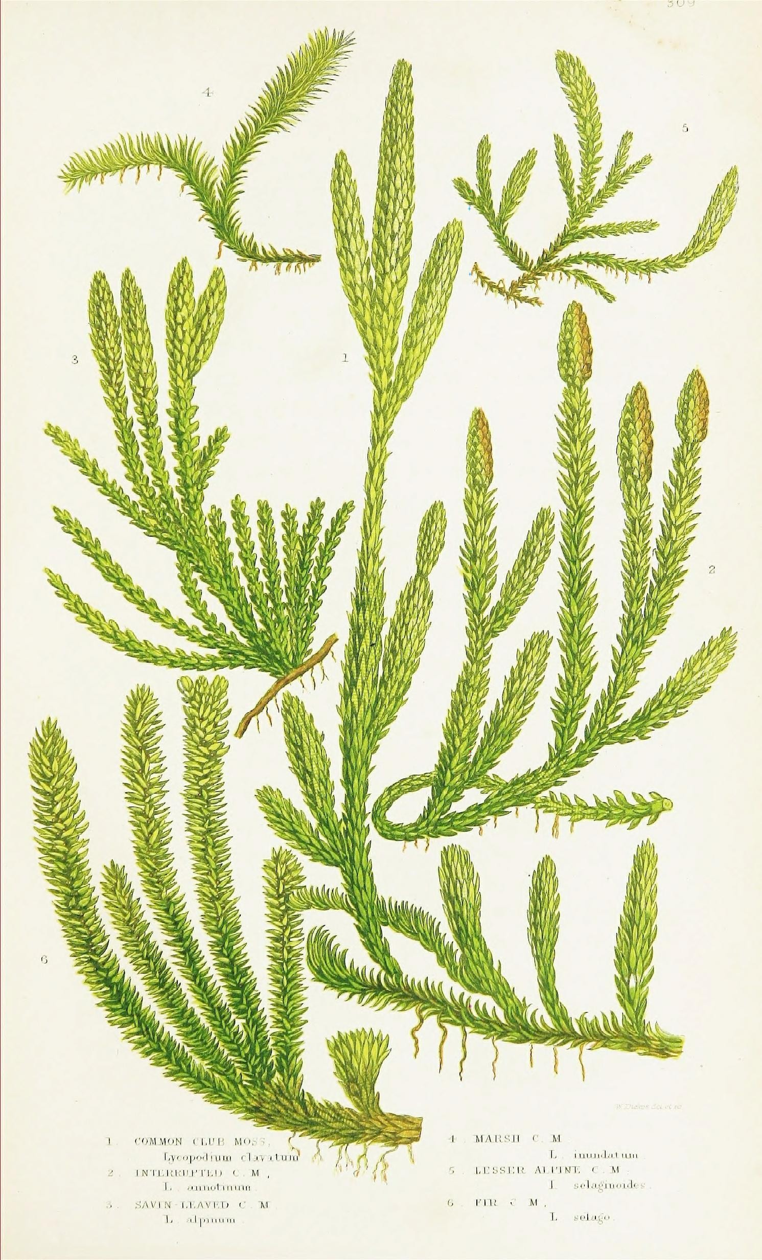 G V\M ■■ M .oia^M